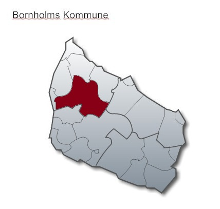 Klemensker Sogn